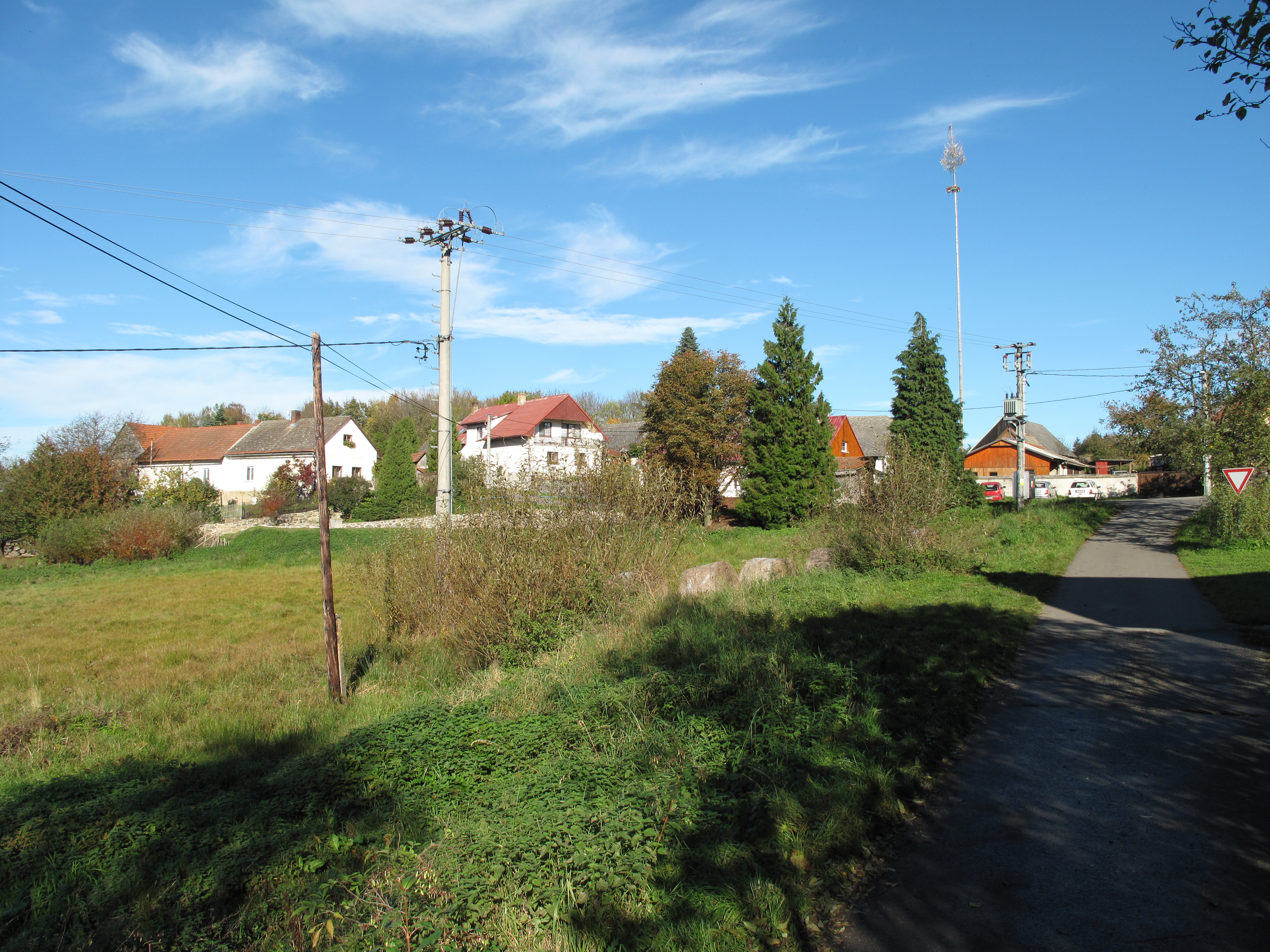 Část Vratkova. Okres Příbram, Česká republika.